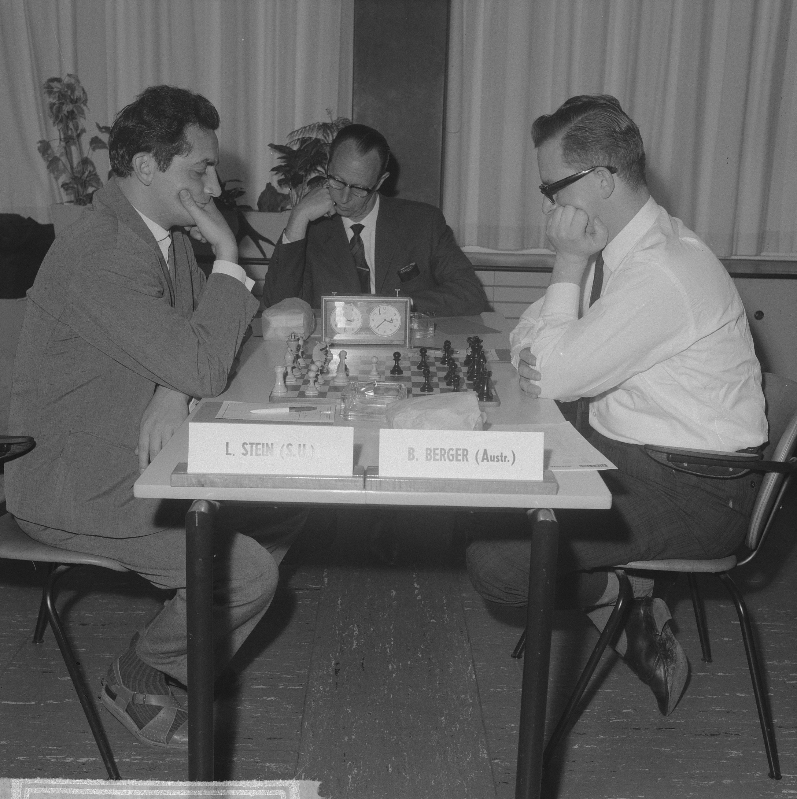 Collectie / Archief : Fotocollectie Anefo Reportage / Serie : [ onbekend ] Beschrijving : Inter zoneschaaktoernooi Leonid Stein vs. Béla Berger Datum : 7 juni 1964 Trefwoorden : schaaktoernooien Persoonsnaam : Ivkov Fotograaf : Broers, F.N. / Anefo Auteursrechthebbende : Nationaal Archief Materiaalsoort : Negatief (zwart/wit) Nummer archiefinventaris : bekijk toegang 2.24.01.03 Bestanddeelnummer : 916-5162